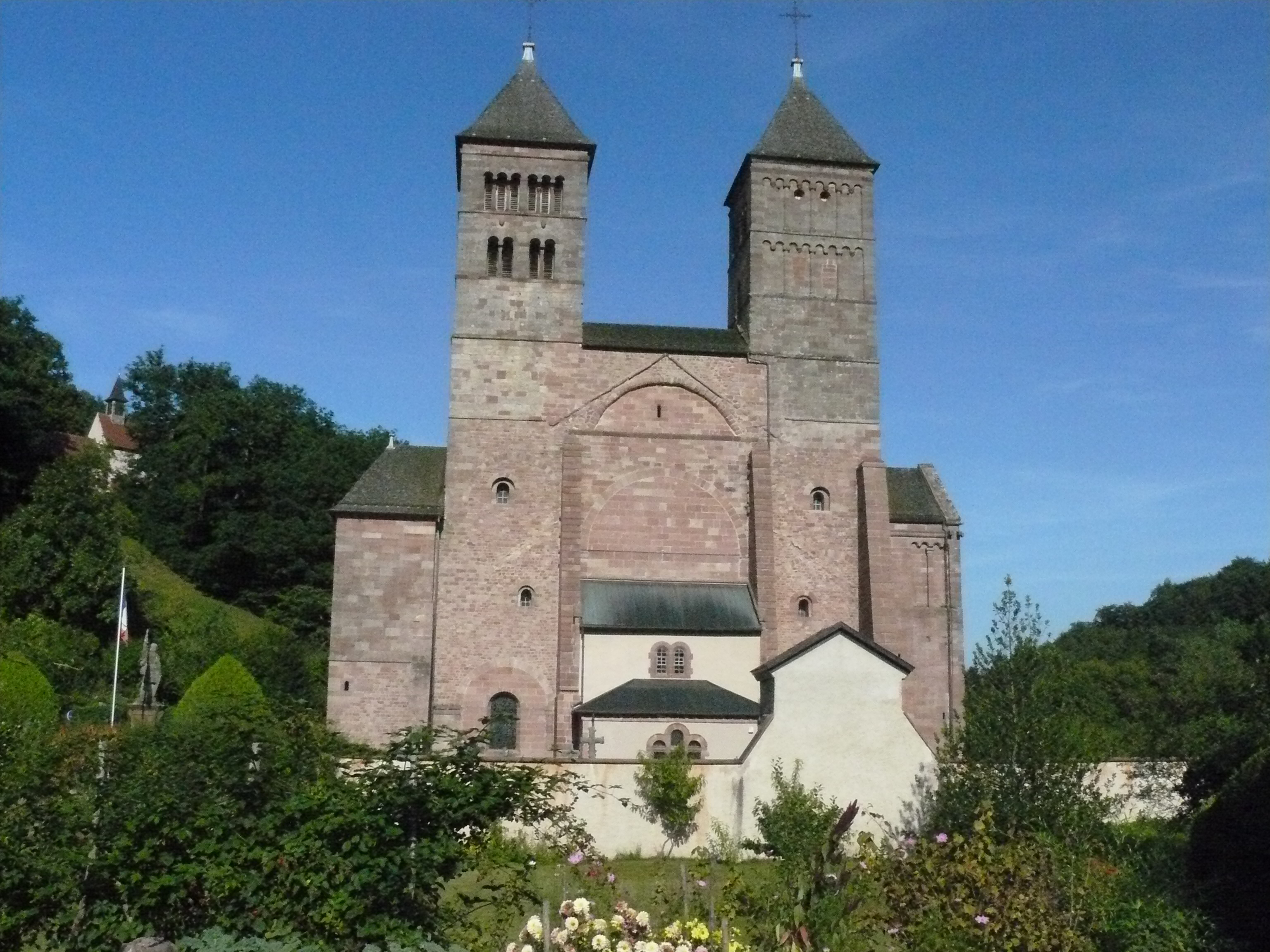 Eglise romane de Murbach